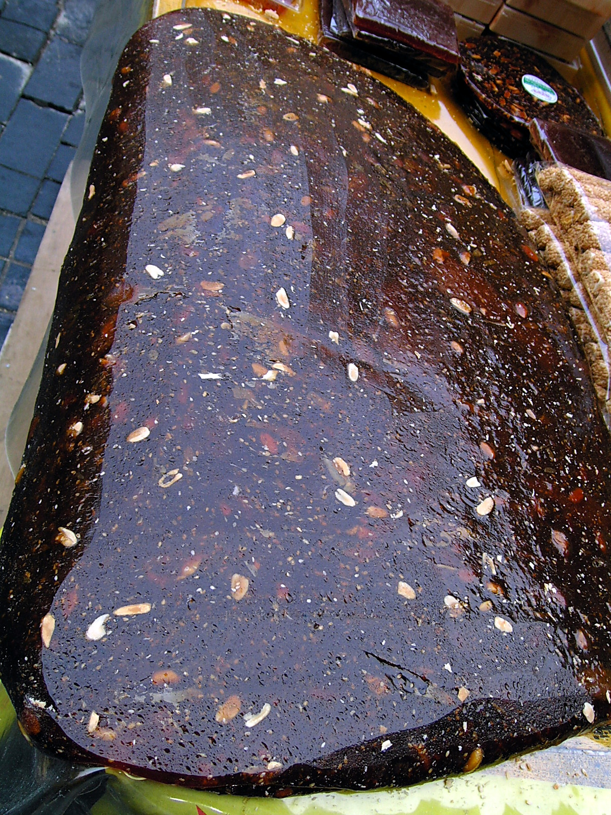 Saenggang yeot, a Korean traditional candy